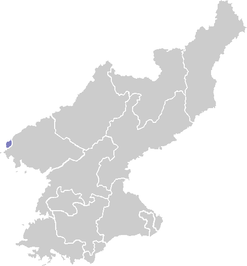 area map of Sinuiju Special Administrative Region